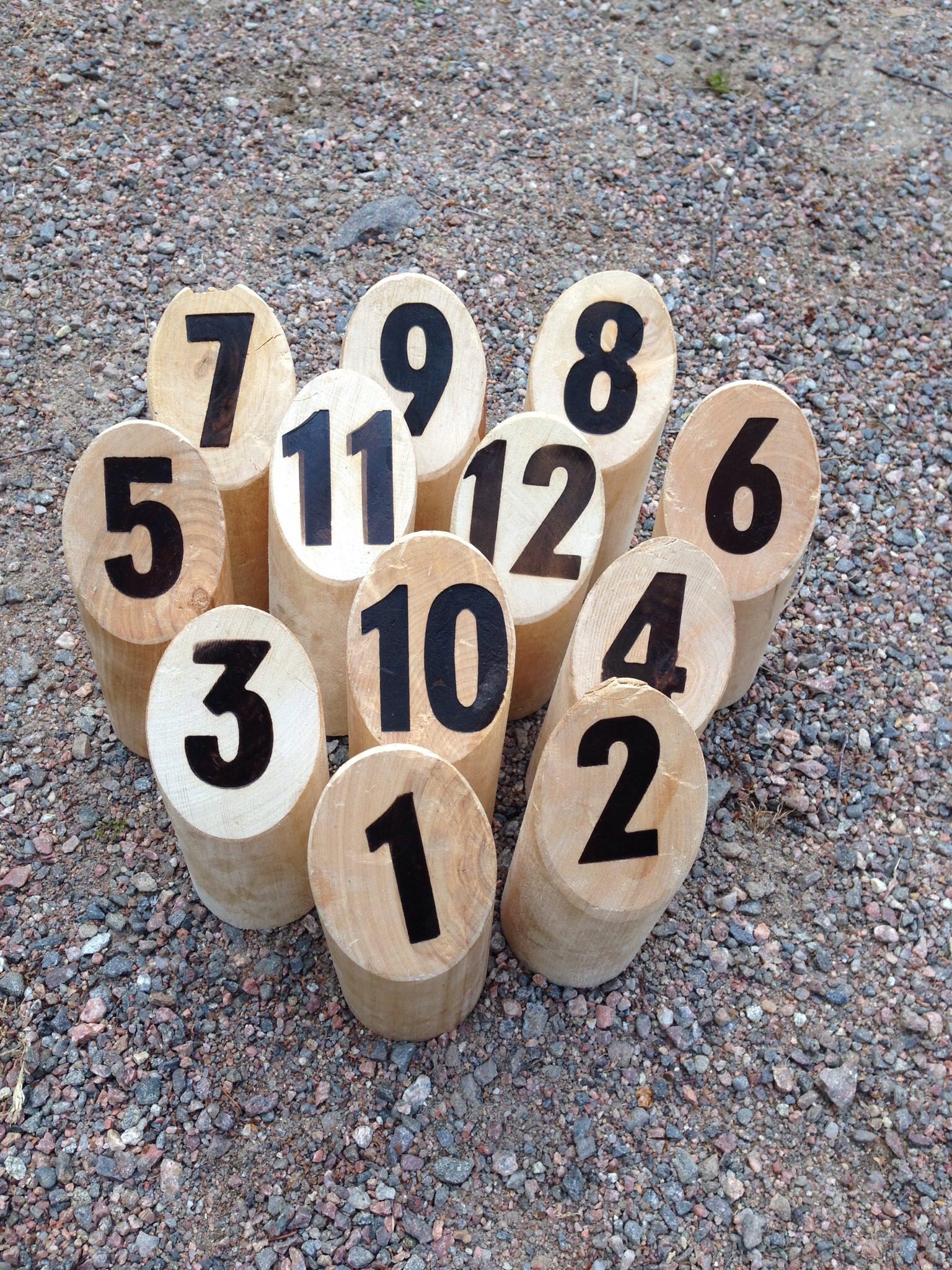 Oikea alkuasetelma